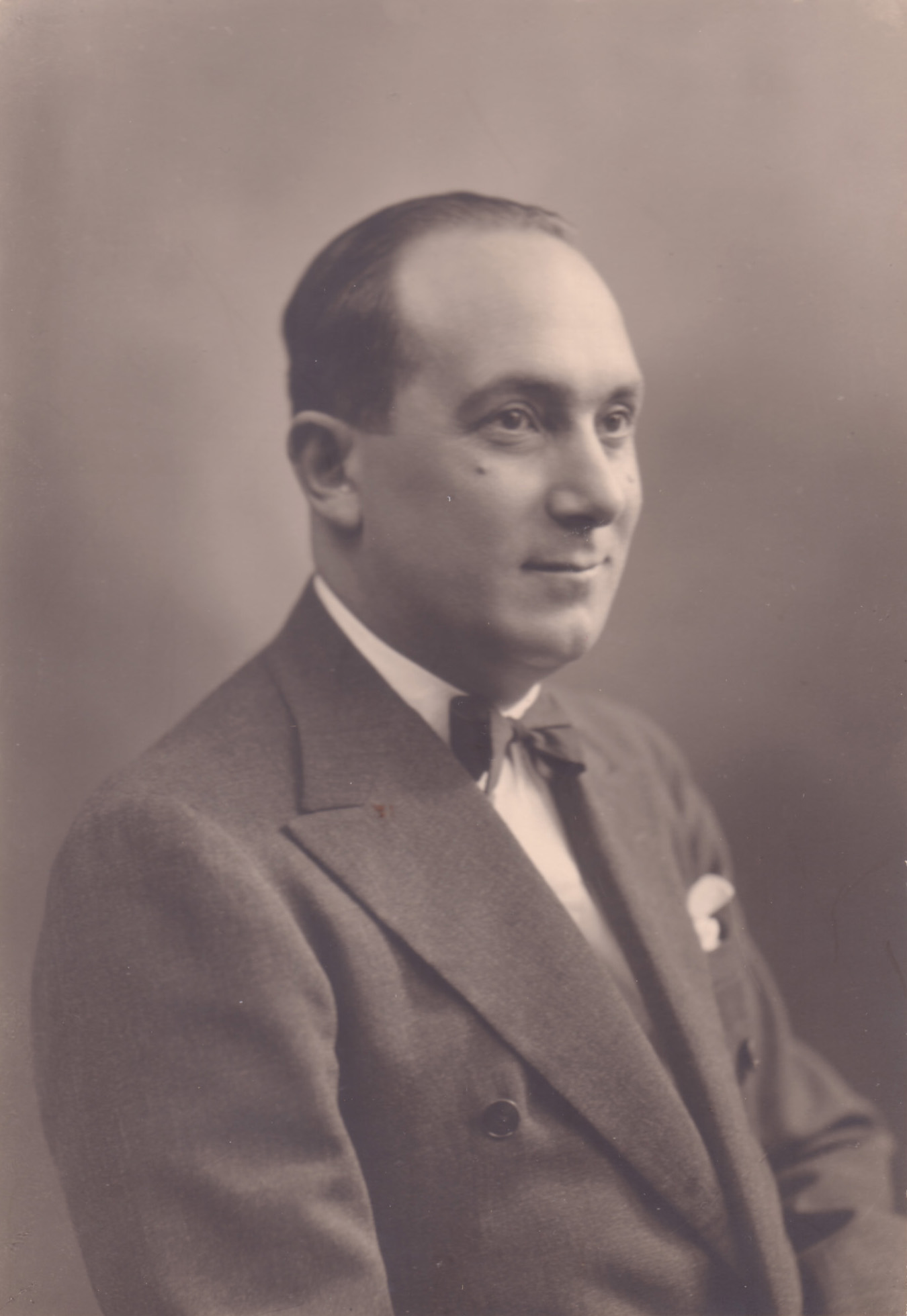 Una de las escasas imágenes de Fidel Fernández Martínez